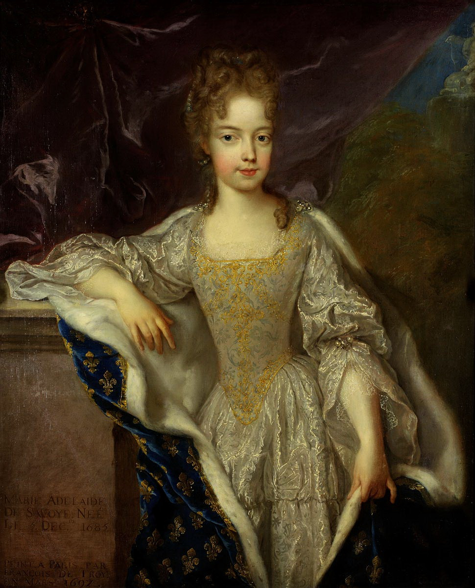 Portrait of Marie Adélaïde of Savoy (1685-1712)